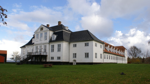 Hellebækgård. Også kendt som Det Kongelige Opfostringshus fra 1953. Nordre Strandvej 129, Hellebæk. Det Kongelige Opfostringshus, Den Thorupske stiftelse flyttede fra Randersgade i København og ind i denne ejendom i Hellebæk i 1953. Indtil 2004 fungerede Det Kongelige Opfostringshus som en kostskole, men i 2004 blev skolen nedlagt, og fundatsen blev ændret til en erhvervsdrivende fond for ejendommen Det Kongelige Opfostringshus. Ejendommen blev derefter anvendt af Københavns Kommune til kursusejendom for familier med problemer. I 2013 startede en privat skole med navnet "Skorpeskolen" i Det Kongelige Opfostringshus's ejendom. Billedet viser hovedbygningen hvor der i fløjen til højre i 1953 var sovesale til 80 elever, men ved ombygning i 2002 blev der ændret til værelser for færre elever. Den høje del af bygningen rummer køkken, opholdsstuer og spisesal. En del af skolebygningen anes til venstre i billedet.